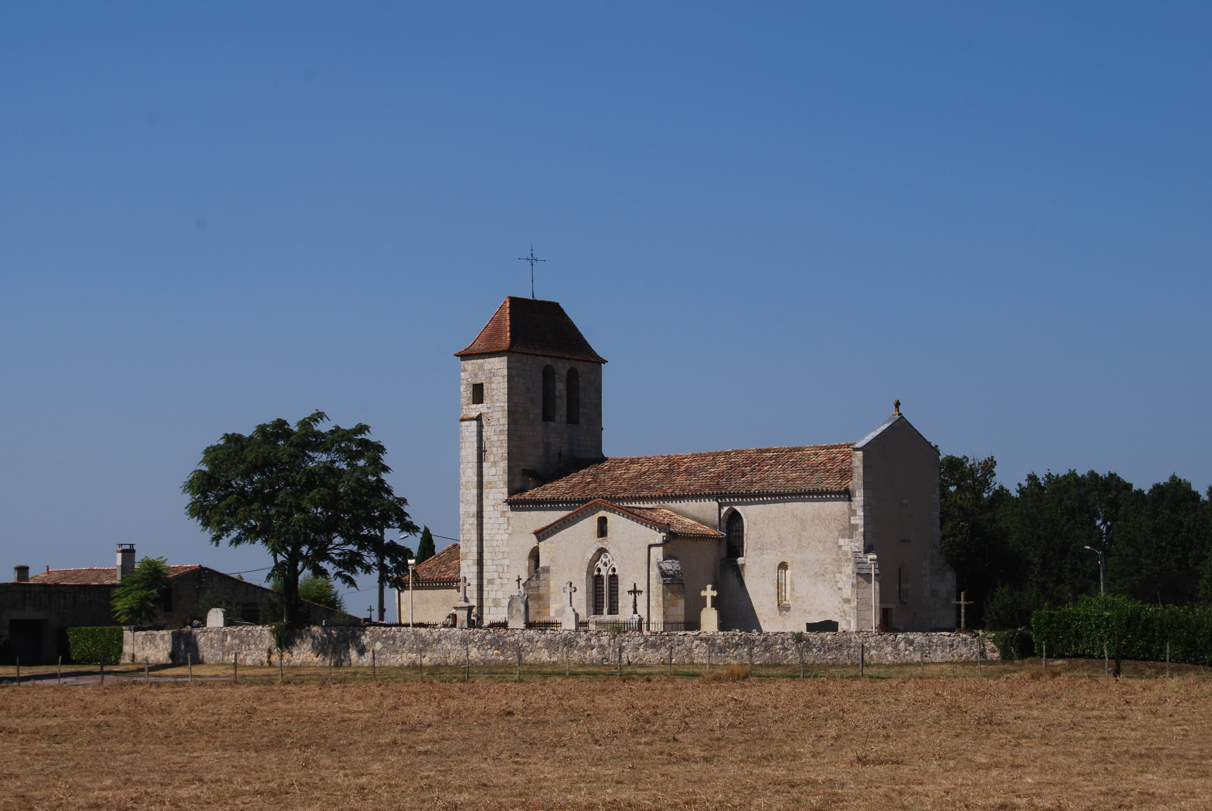 Église de Cameyrac, (Inscrit, 1925) .